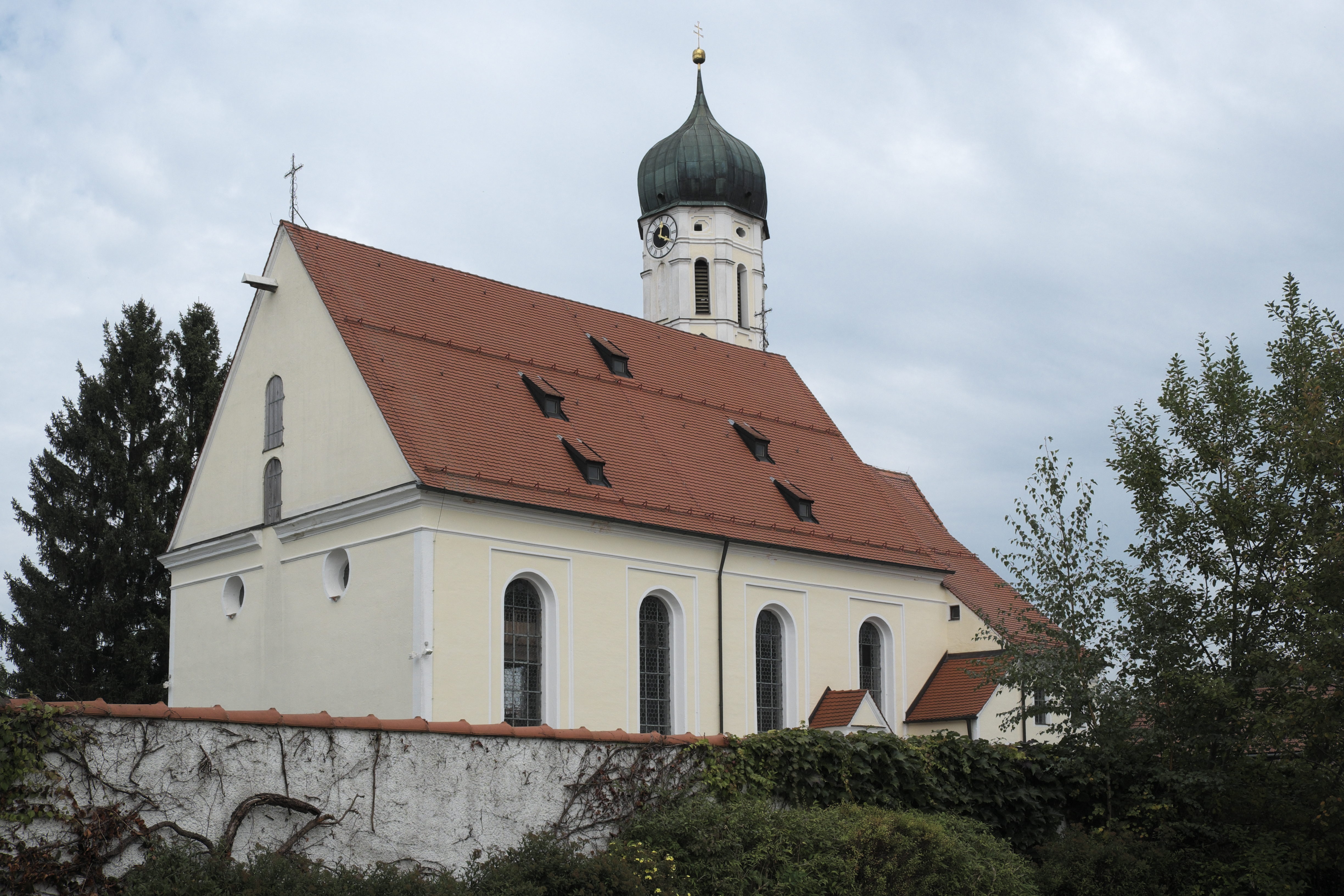 Katholische Pfarrkirche St. Johann Baptist in Asch (Fuchstal) im Landkreis Landsberg am Lech (Bayern/Deutschland)